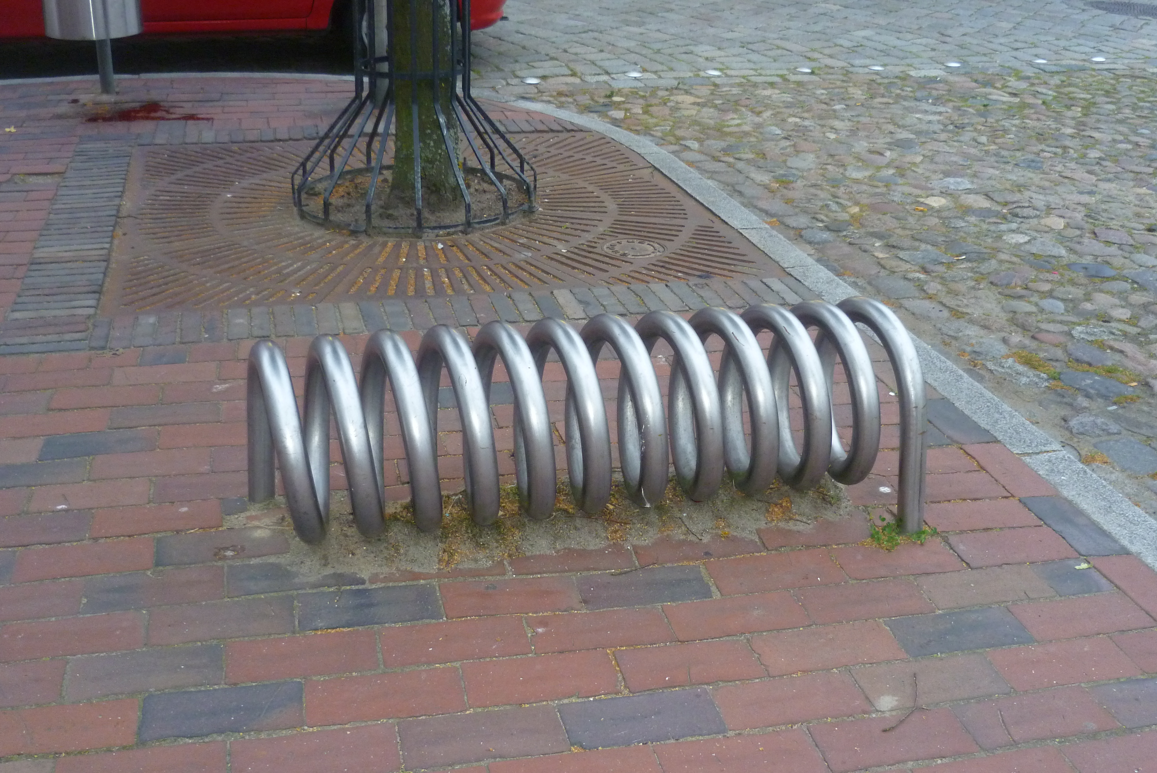 Fahrradabstellanlage in Tönning/Deutschland